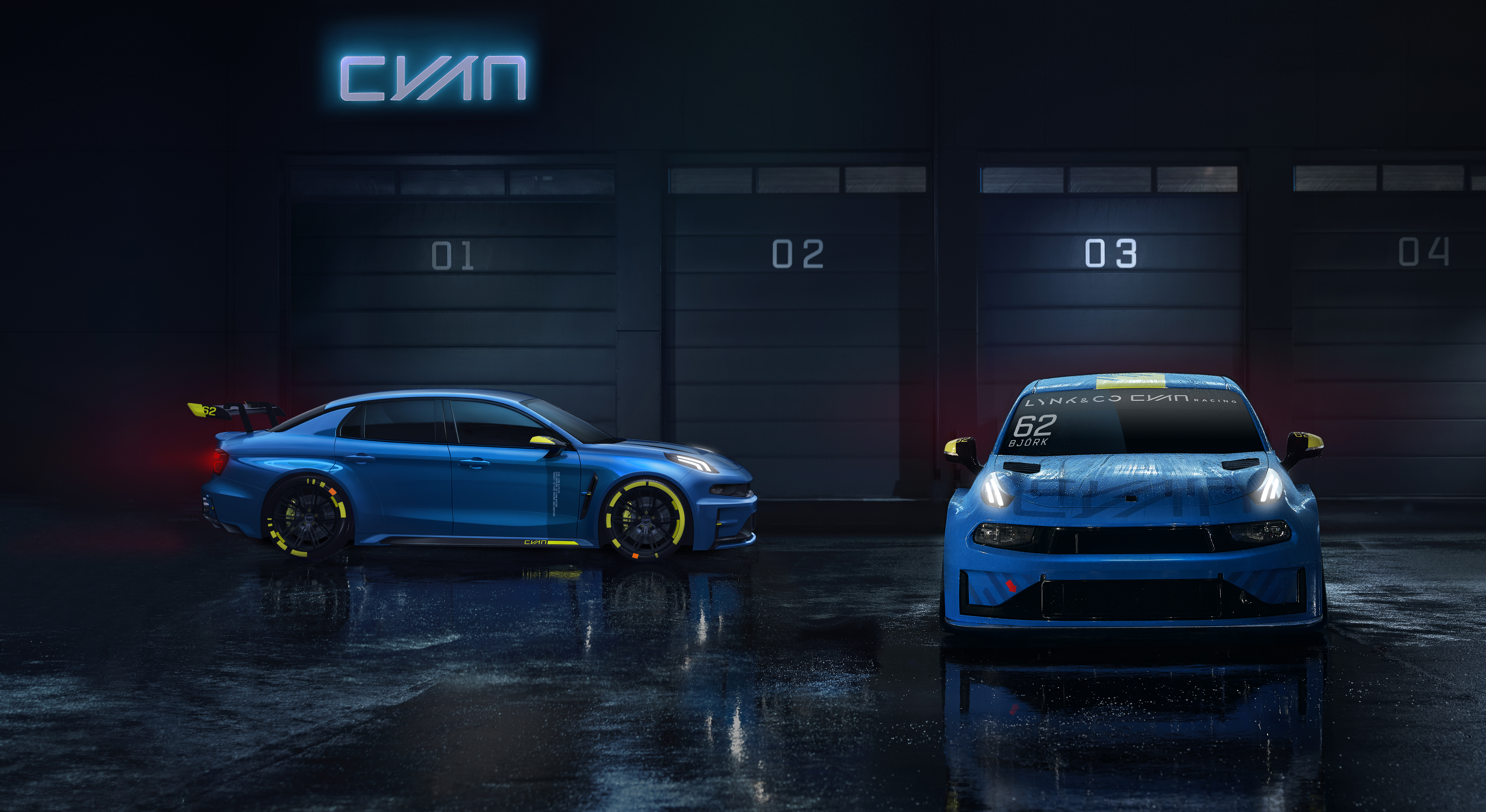 The Lynk & Co 03 Cyan Concept car and the Lynk & Co 03 TCR race car.